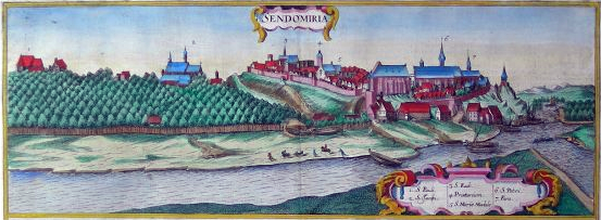 Sandomierz in XVII century